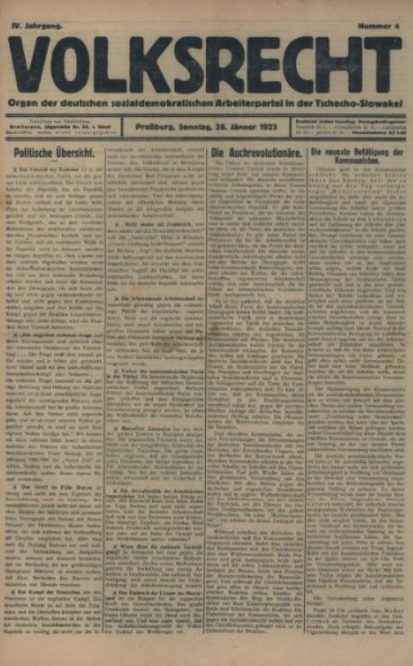 Titulná strana denníka Volksrecht, ktorý vychádzal v Bratislave v 20-ych rokoch 20. storočia.